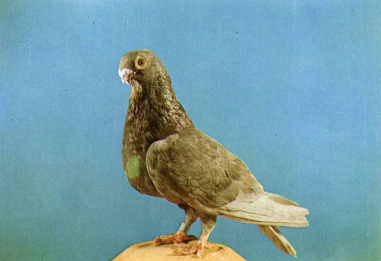 Pombo Mariolinha raça portuguesa